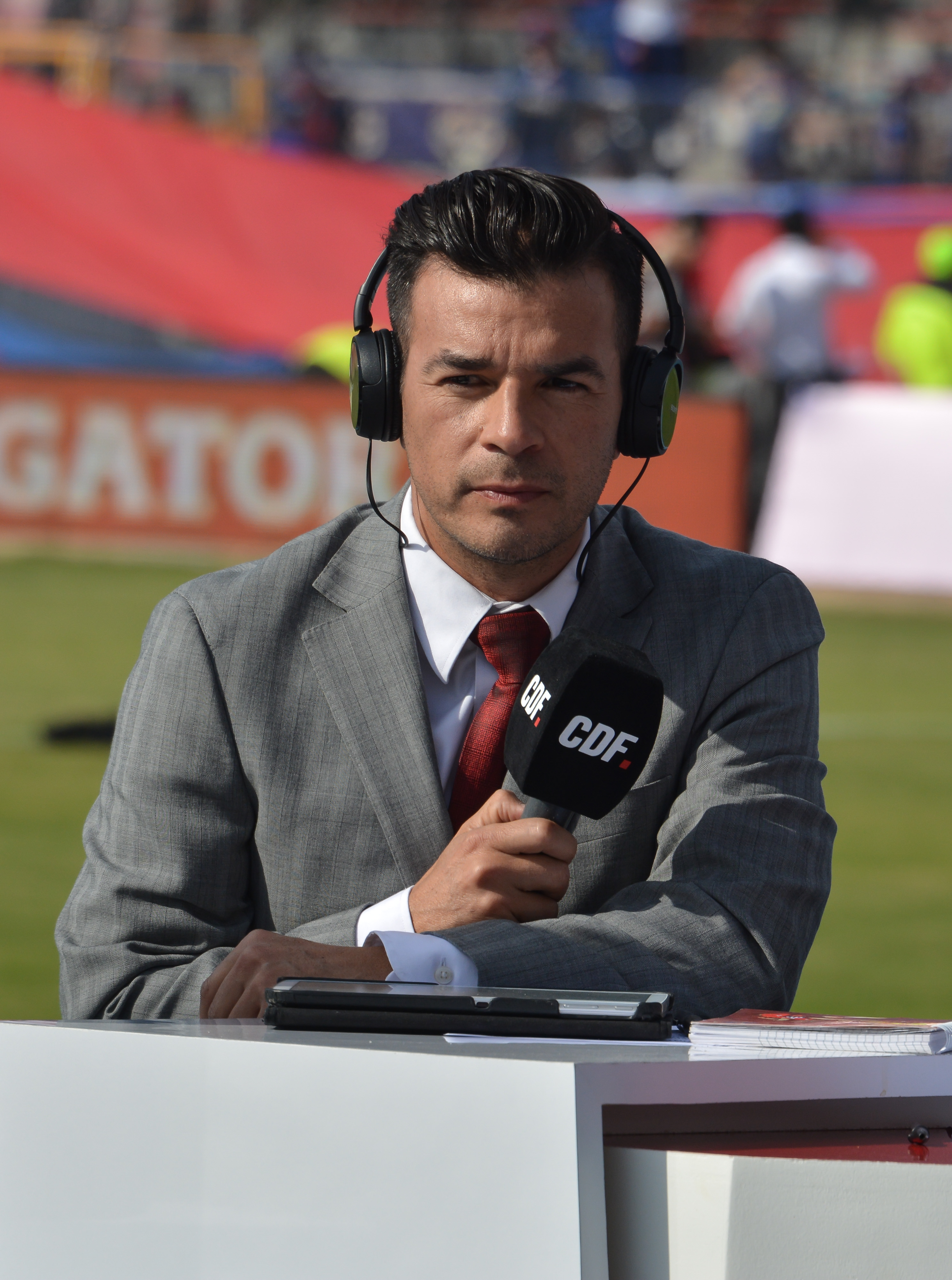 Sebastián González, Universidad de Chile v Colo-Colo, Estadio Nacional, Santiago, Chile.